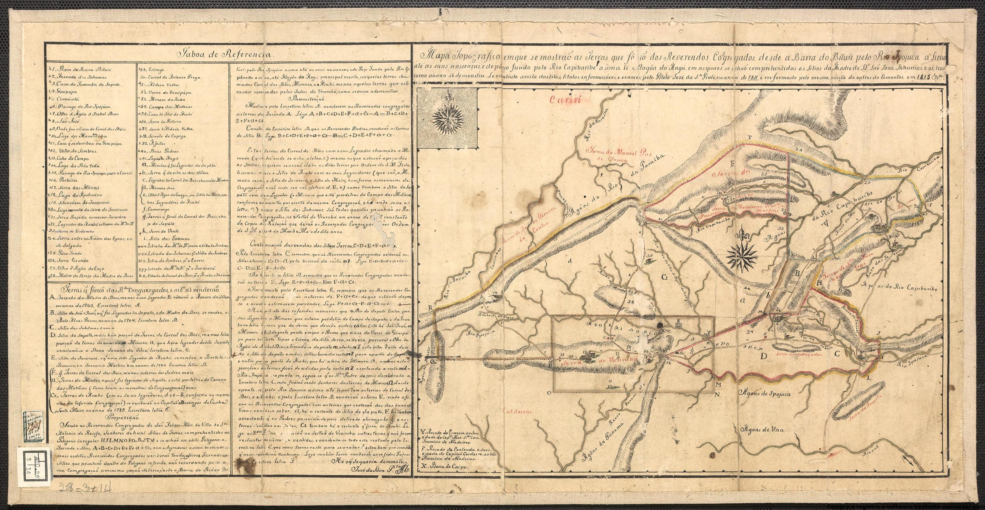 According to the Brazilian Copyright Law (Lei 9.610 de 19 de fevereiro de 1998; See translation) Article 44: The economic rights in audiovisual and photographic works shall be protected for a period of 70 years from the first of January of the year following that of their disclosure; Article 96: The term of protection of neighboring rights shall be 70 years from the first of January of the year following fixation for phonograms, transmission for the broadcasts of broadcasting organizations and public performance in other cases. Hence, this media file is under no copyrights. See Recursos no domínio público.